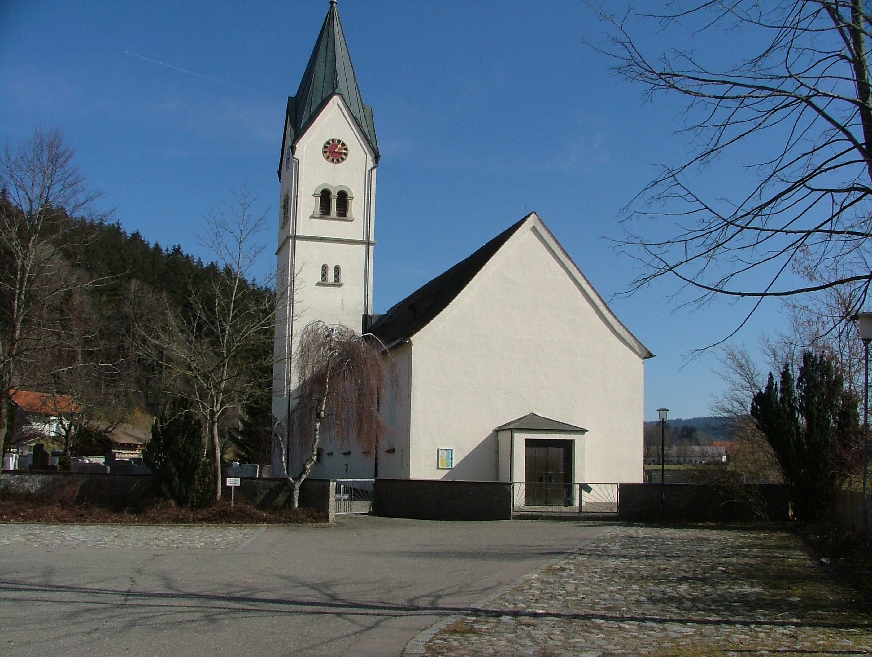 Hinznang